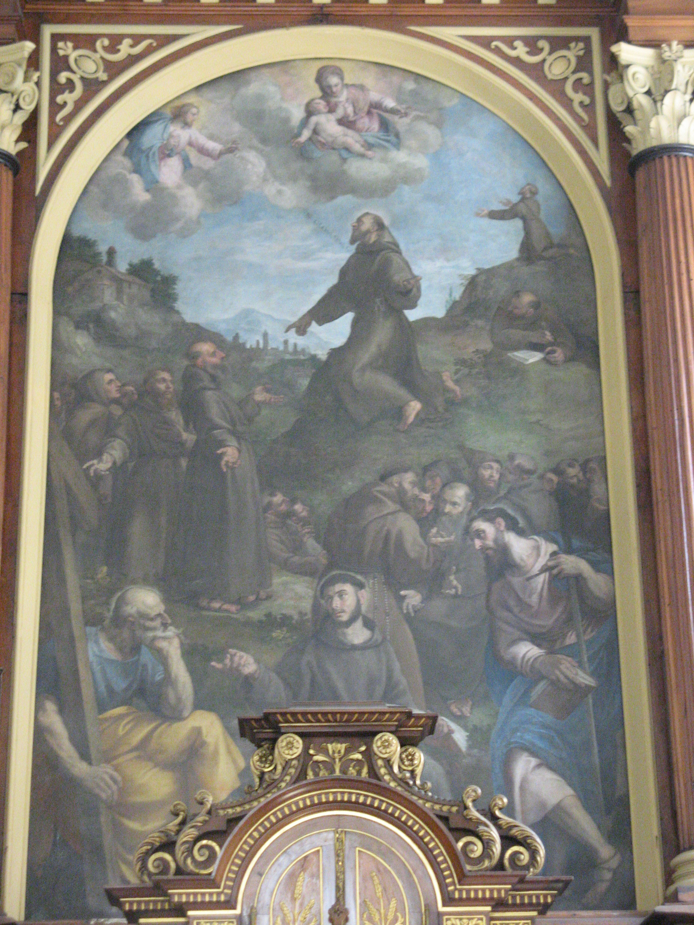 Hochaltarbild mit Hll. Antonius und Franziskus von Felice Brusasorci (1600), Kapuzinerkirche, Bozen